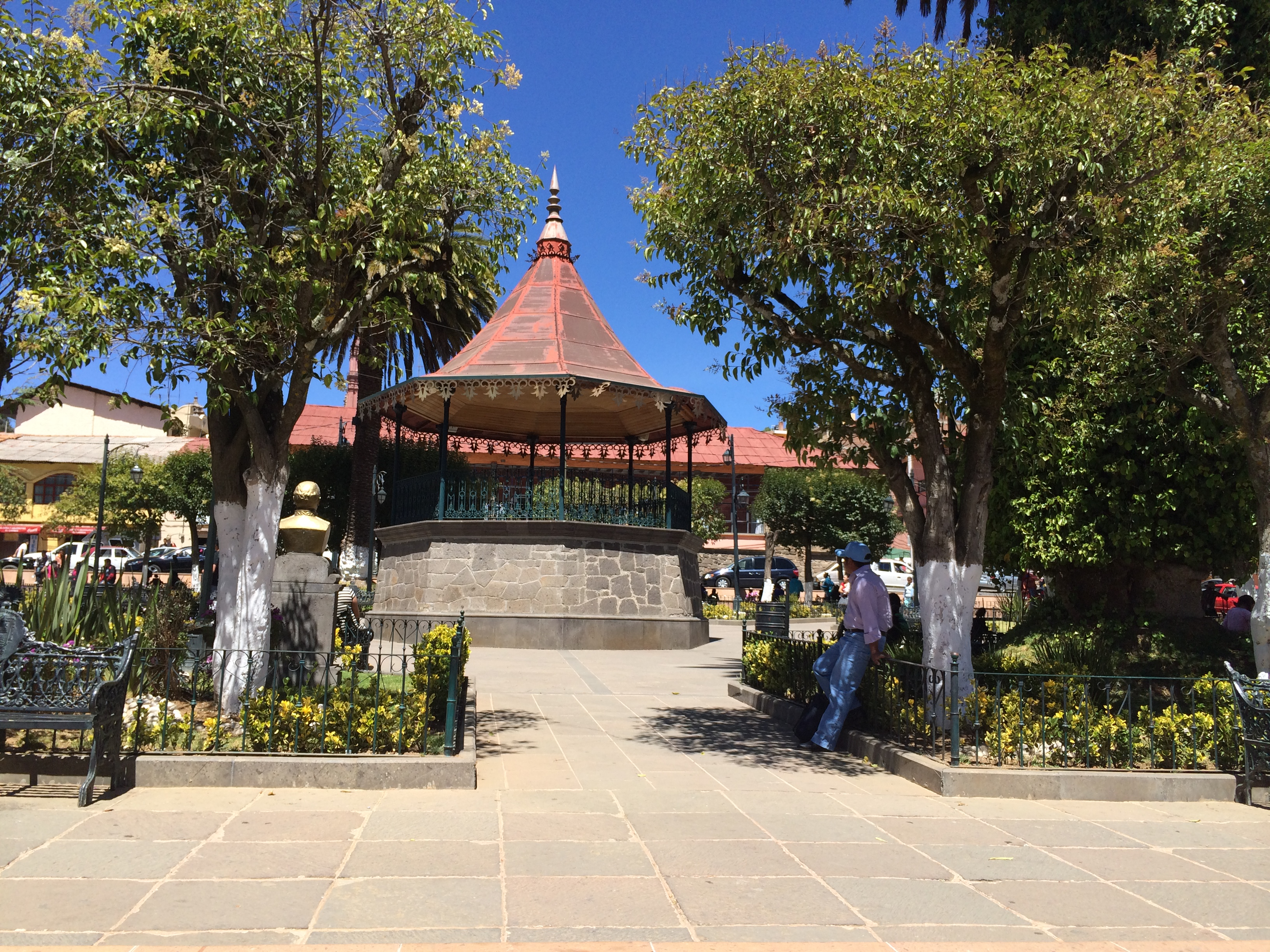 Quiosco principal en el centro del pueblo, acompañado de árboles y áreas. Ubicado en Tlalpujahua, Michoacán. México.